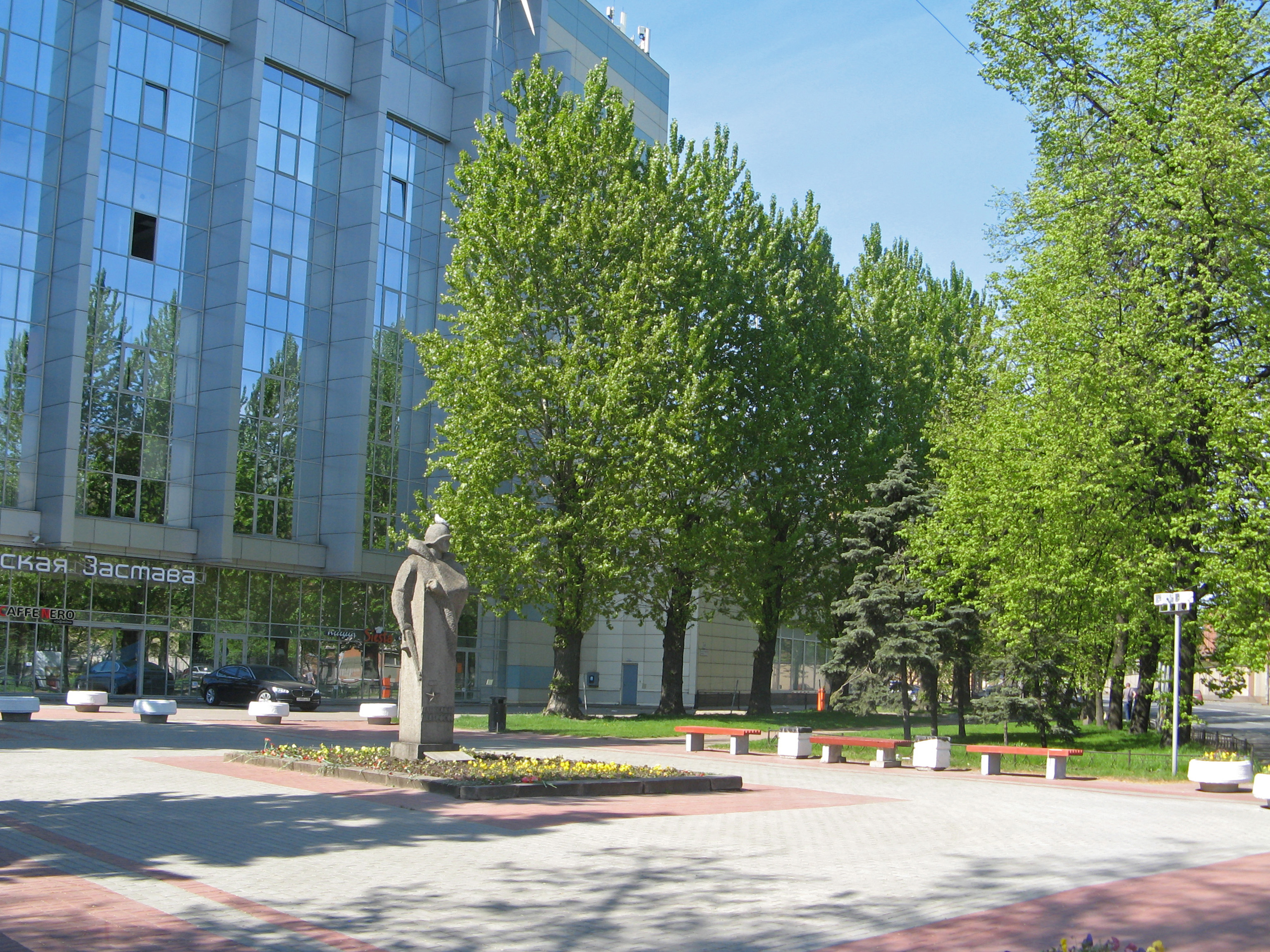 Санкт-Петербург, ул. Александра Матросова и Большой Сампсониевский пр., памятник А. Матросову